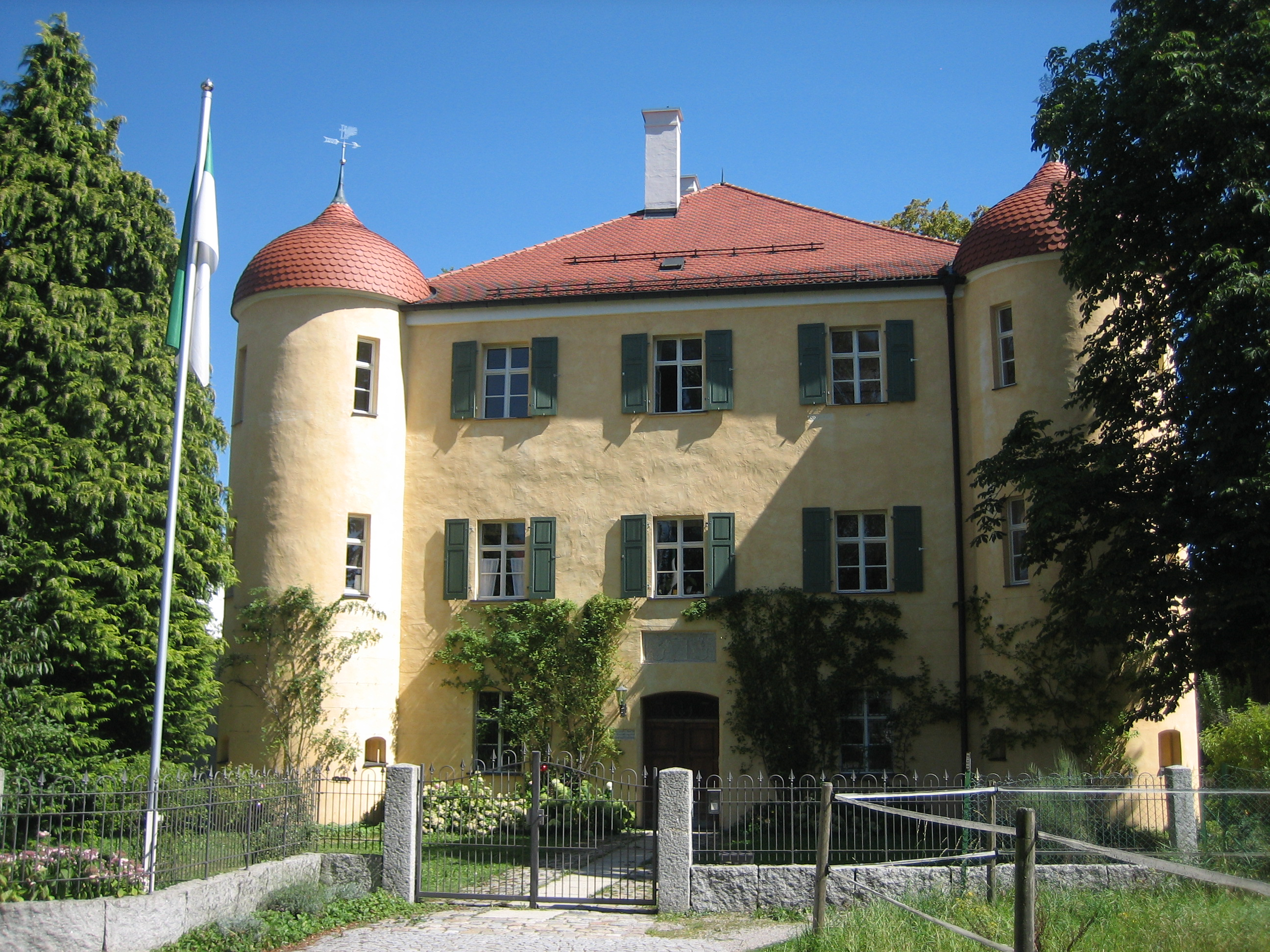 Schlößle in Bad Grönenbach, 1563 erbaut durch die von Pappenheimer